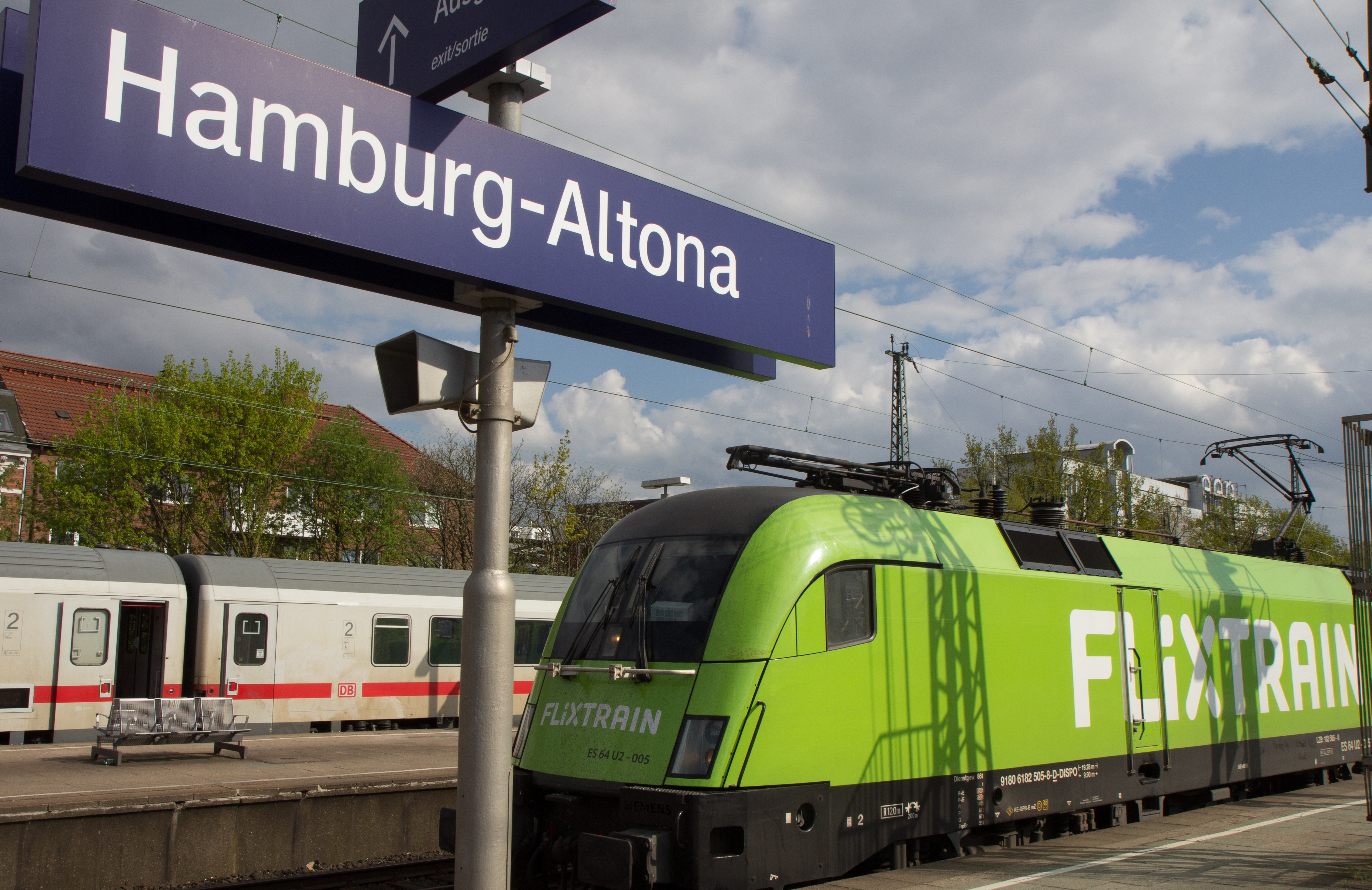 Flixtrain der Flixmobility im Bahnhof Hamburg Altona und auf der Fahrt bis Hamburg Haptbahnhof. Fotoarbeiten mit Akkreditierung der Pressestelle.